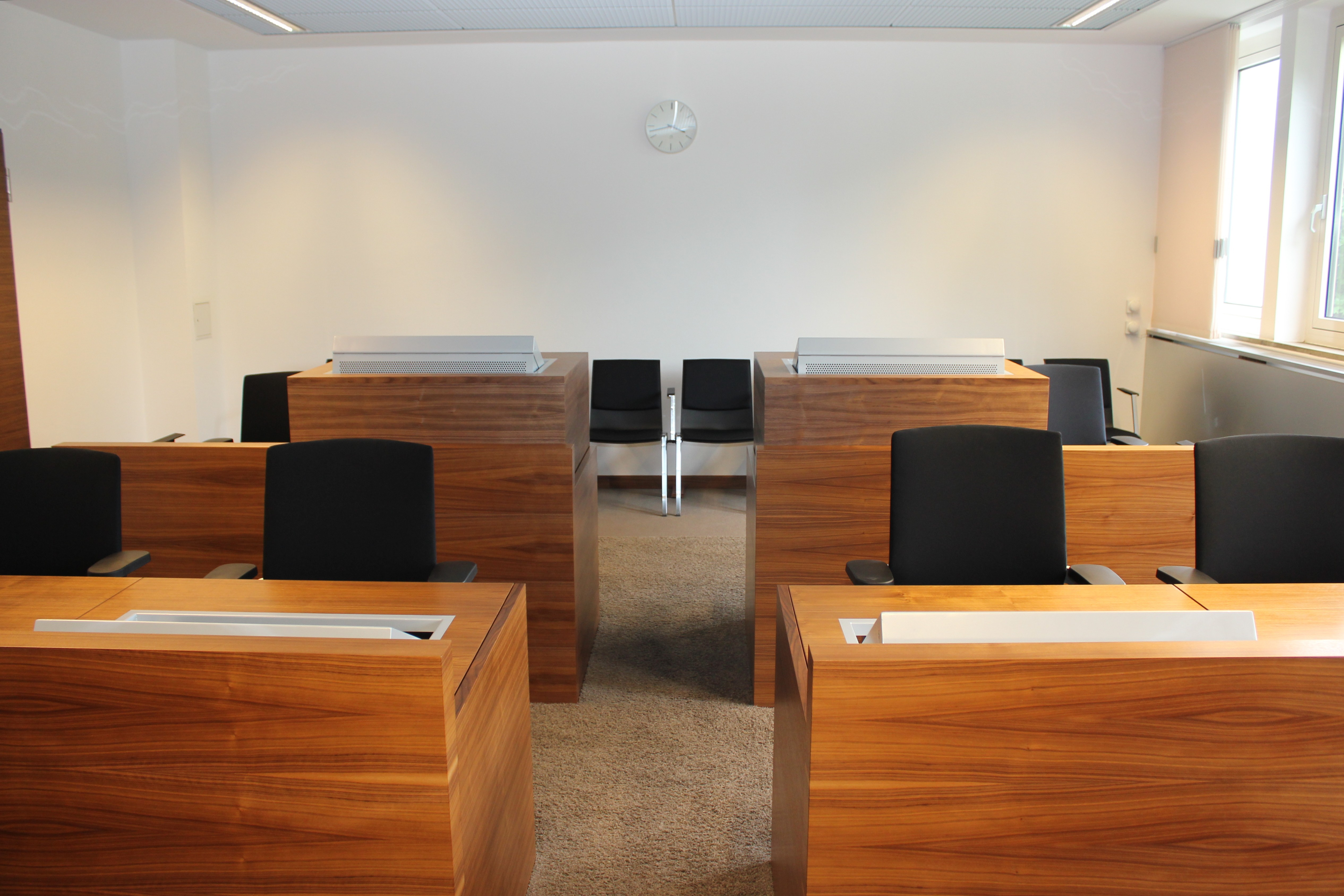 Das Bundespatentgericht in München. Fotografiert im Rahmen des Landtagsprojektes Bayern 2012. Wikipedia im Landtag – Bayern 17. bis 19. Juli 2012 in München Dieses Foto wurde im Rahmen des Projektes „Wikipedia im Landtag“ erstellt.